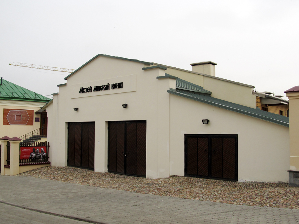 Мінск. Музей мінскай конкі. Вуліца Кірыла і Мяфодзія, 8Д